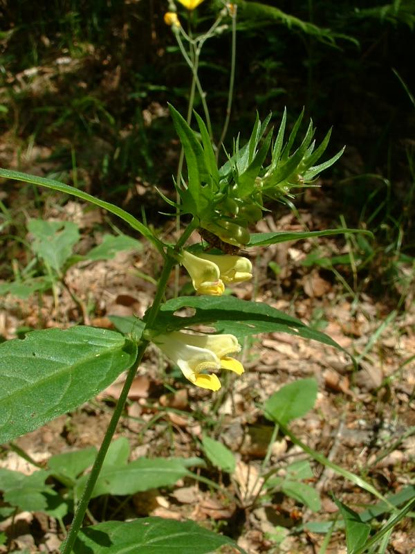 Mélampyre des prés, Bucey-lès-Gy.